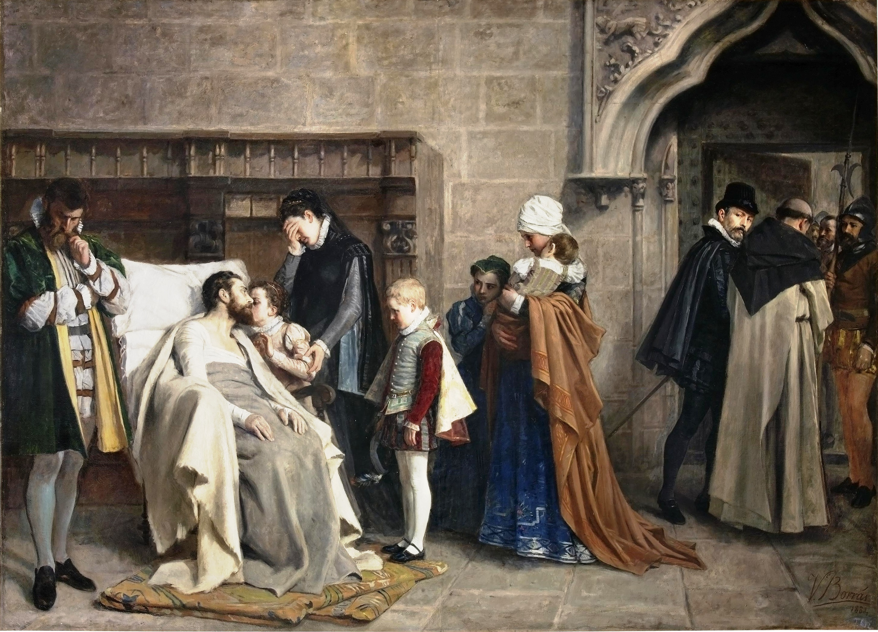 La obra representa a Antonio Pérez (1540-1611), que fue secretario del rey Felipe II de España, recibiendo a su familia después de haber sido torturado tras haber sido acusado de participar en el asesinato de Juan de Escobedo, el secretario de Don Juan de Austria, que era hermanastro del rey Felipe II de España.